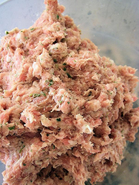 Brät/gewürzte Fleischmasse für die Wurstherstellung